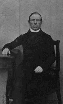 Jan Křtitel Drbohlav (1811 - 1877), Český římskokatolický duchovní, hudební skladatel, překladatel, pedagog, básník, teolog, historik a konzistorní kancléř.